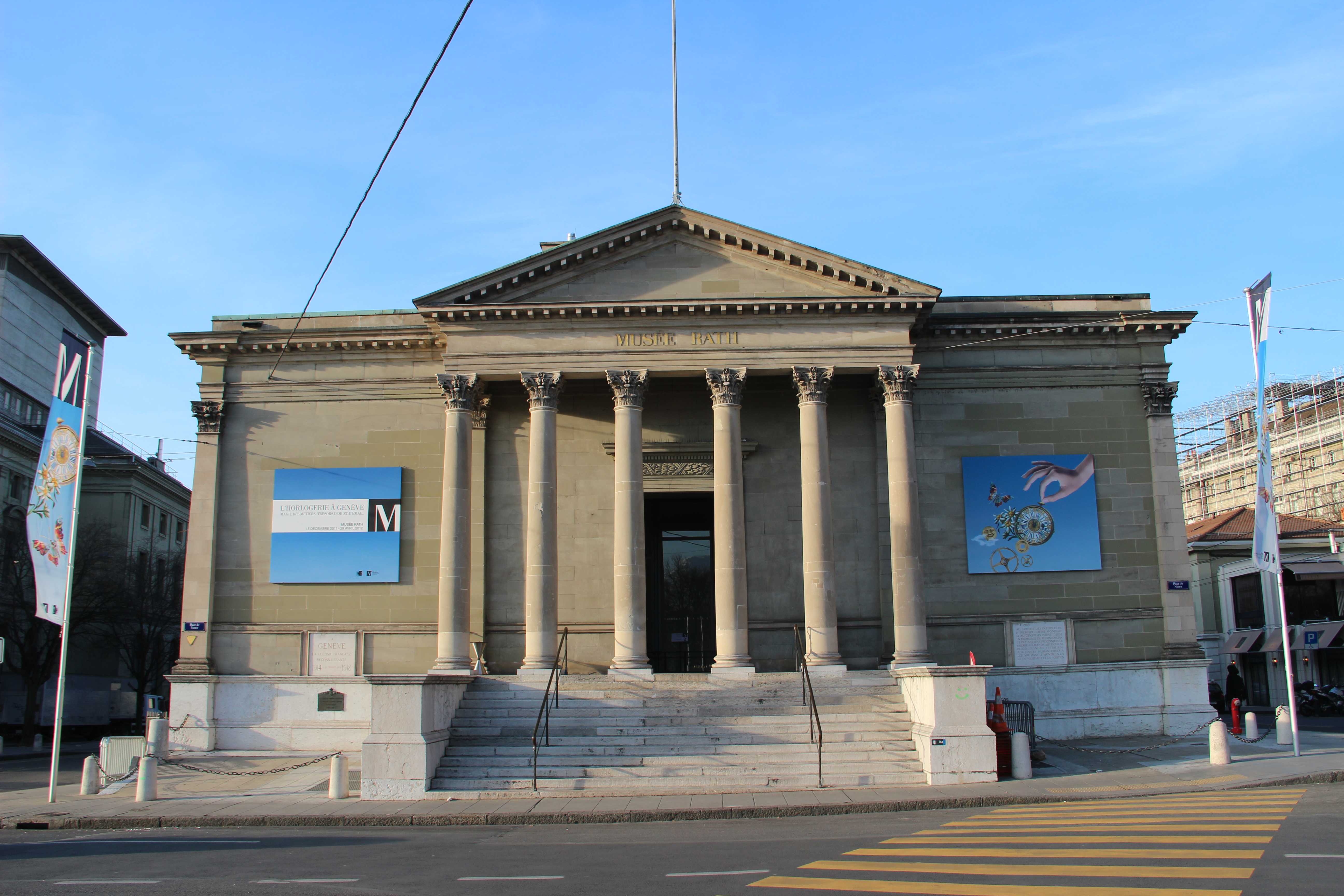 Musée Rath